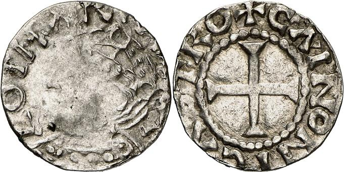 Denier de Lothaire (954-986) frappé à Chinon (Indre-et-Loire). Avers : +LOTHARIVS REX seuls les pieds de lettres sont visibles. Tête couronnée à gauche. Revers : +CAINONI CASTRO croix.